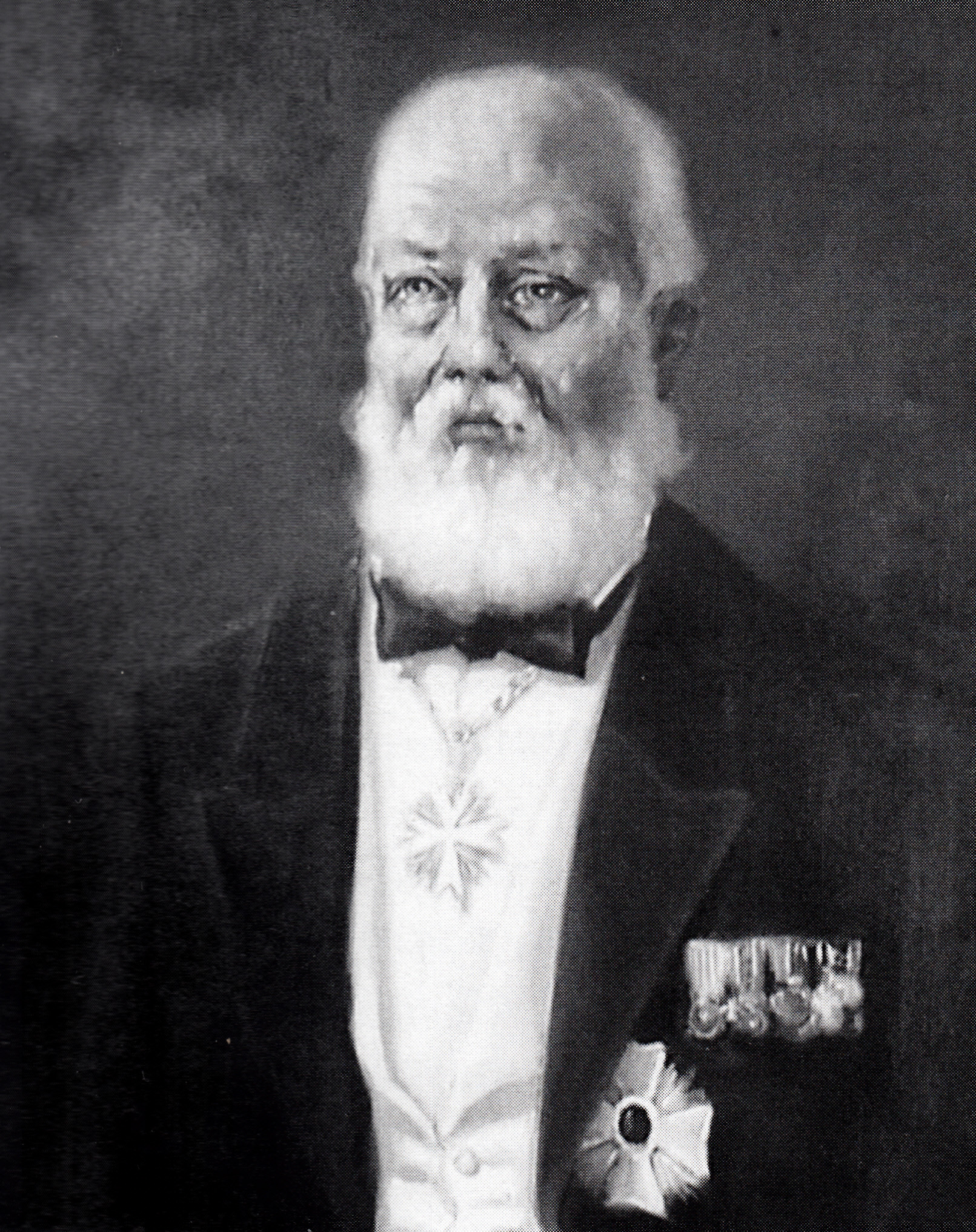 Ritratto del barone Diego Aliprandi